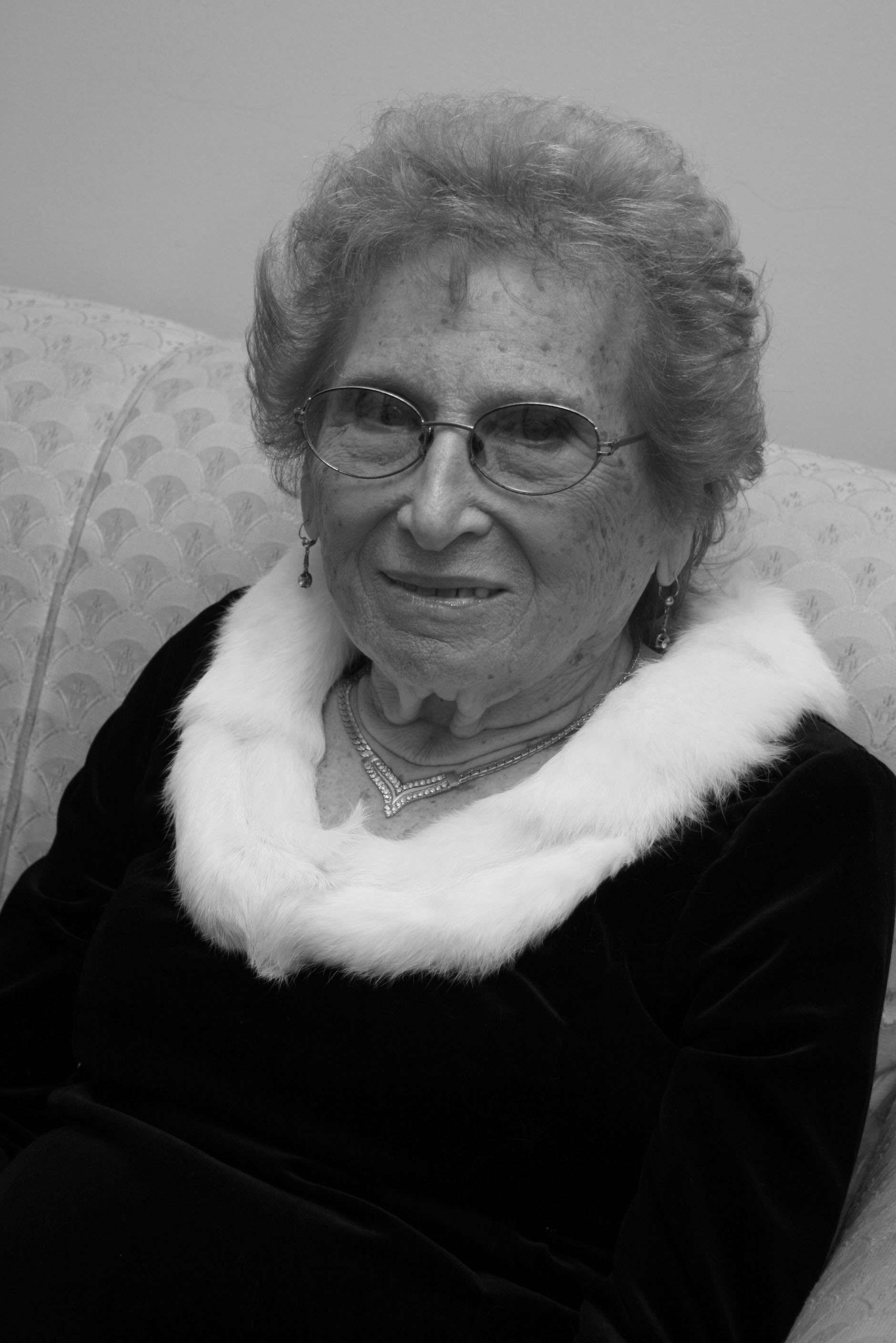 Rosa a los 90 años.